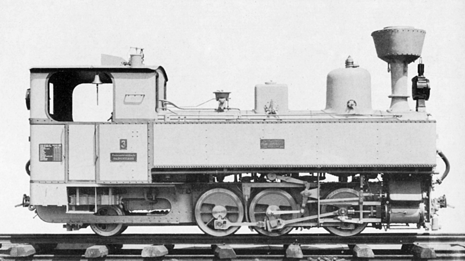 Locomotive No. 3 (later U.7) of the Waldviertler Schmalspurbahnen in Lower Austria, work's photograph - Lokomotive 3 (später U.7) der Waldviertler Schmalspurbahnen, Werksfoto